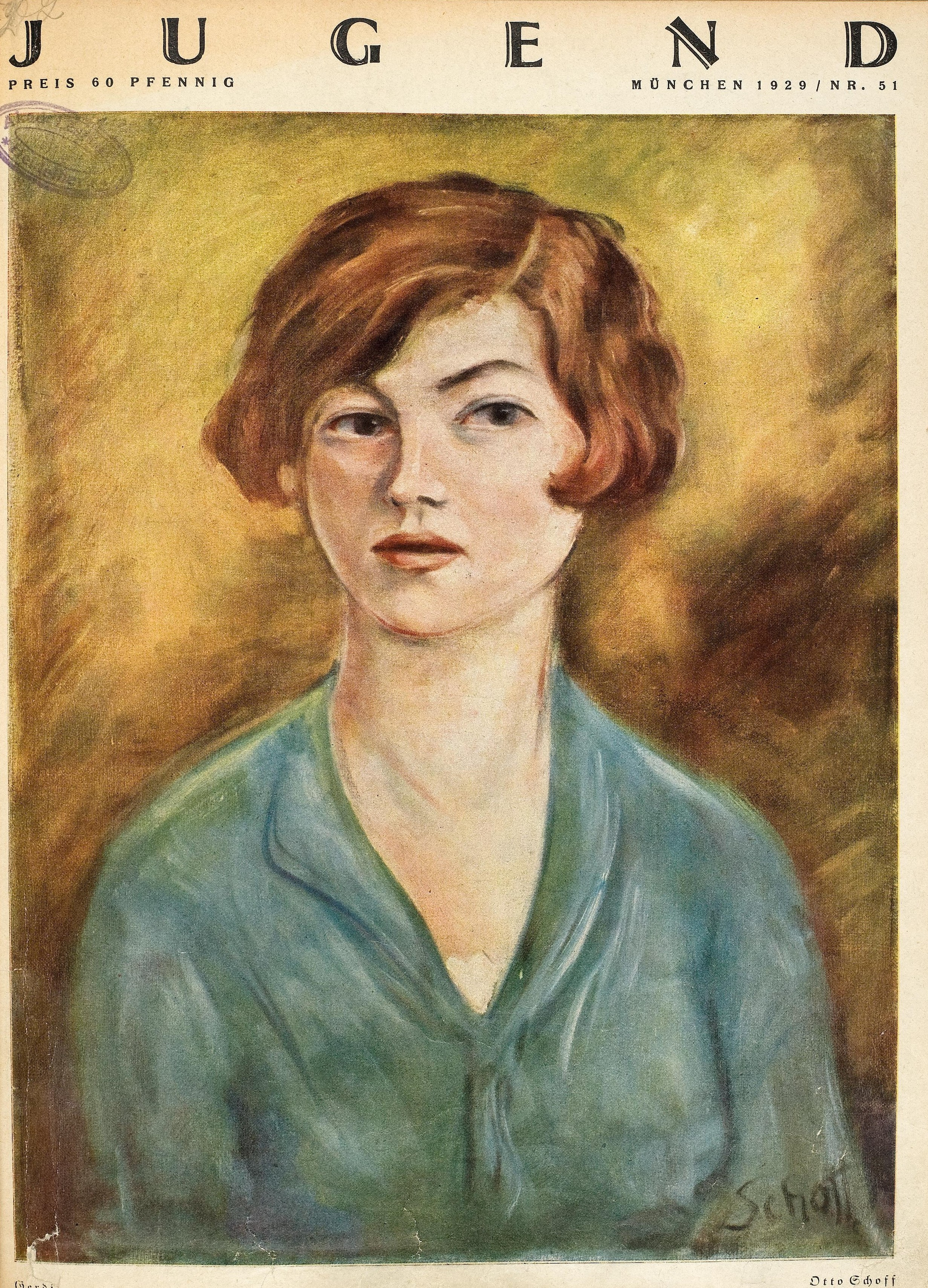 Otto Schoff - Gerdi. Umschlag der Kunst- und Literaturzeitschrift "Jugend", Ausgabe Nr. 51/1929